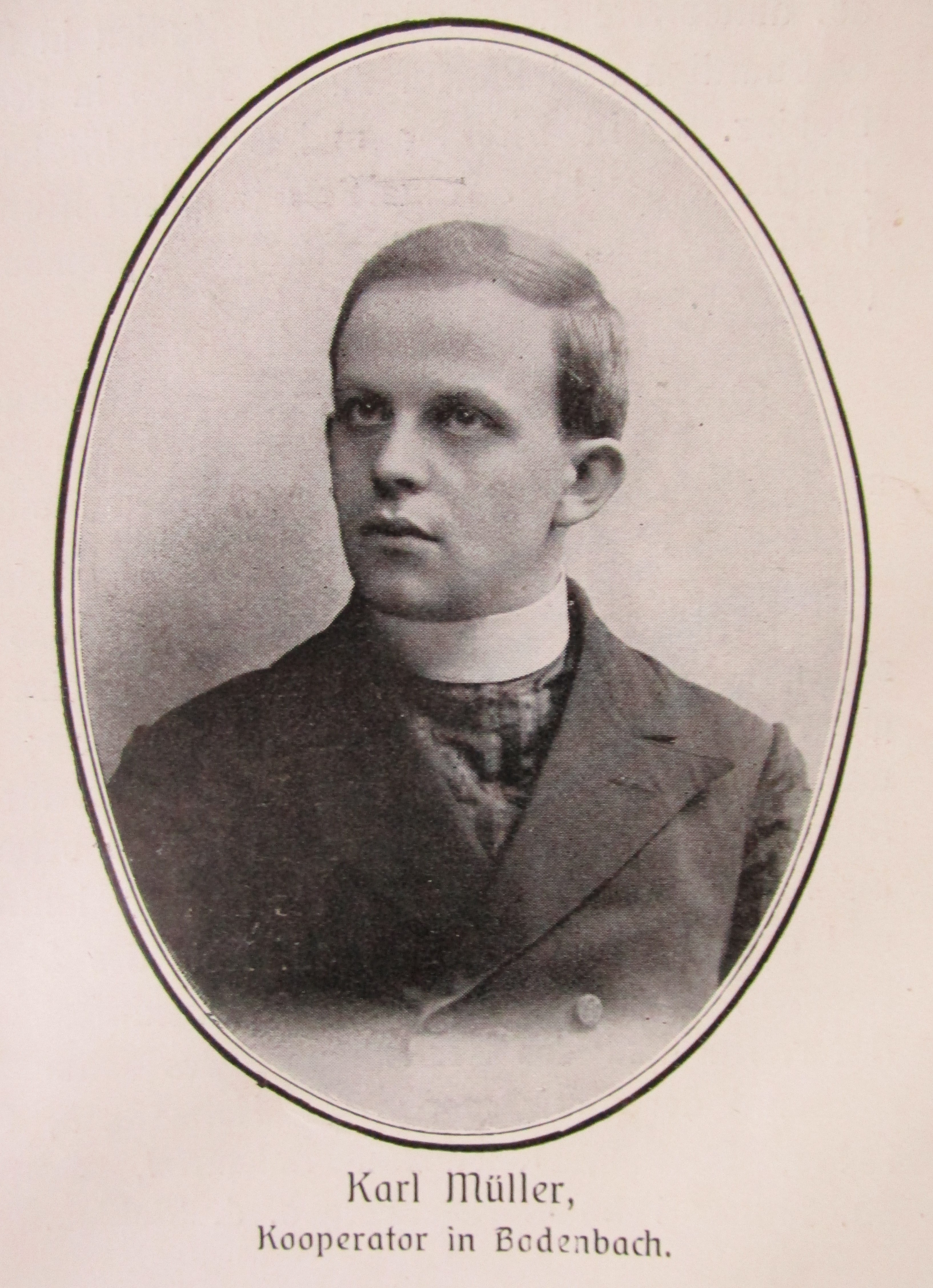 P. Karl Stephan Müller; * 03. 01. 1885 v 7.45 hodin v Mimoni, čp. 18/IV; syn: Gustav Josef Müller - pekař, syn Antona Müllera a Theresie, dcery Josefa Ulbricha; Anna Karolina, dcera Karla Bürgermeistra ze Zákup a Marie Anny roz. Wünsch; gymnaziální studia na Gymnáziu v Bohosudově filosoficko - teologická studia v Litoměřicích; ord. na kněze 1909; kaplan v Děčíně - Podmoklech; + 29 01. 1951 v Děčíně